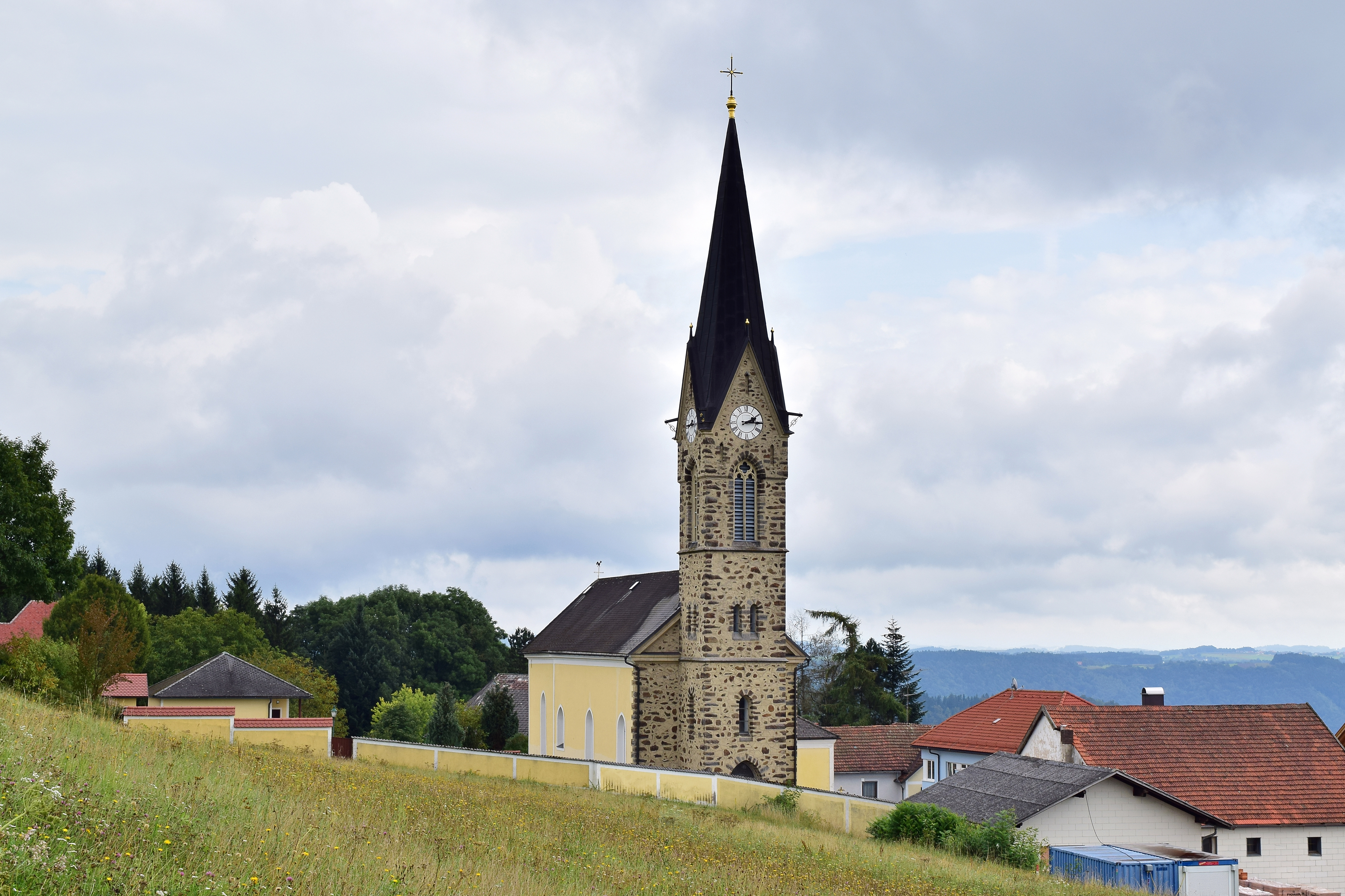 Kath. Pfarrkirche hl. Nikolaus und Kirchhof